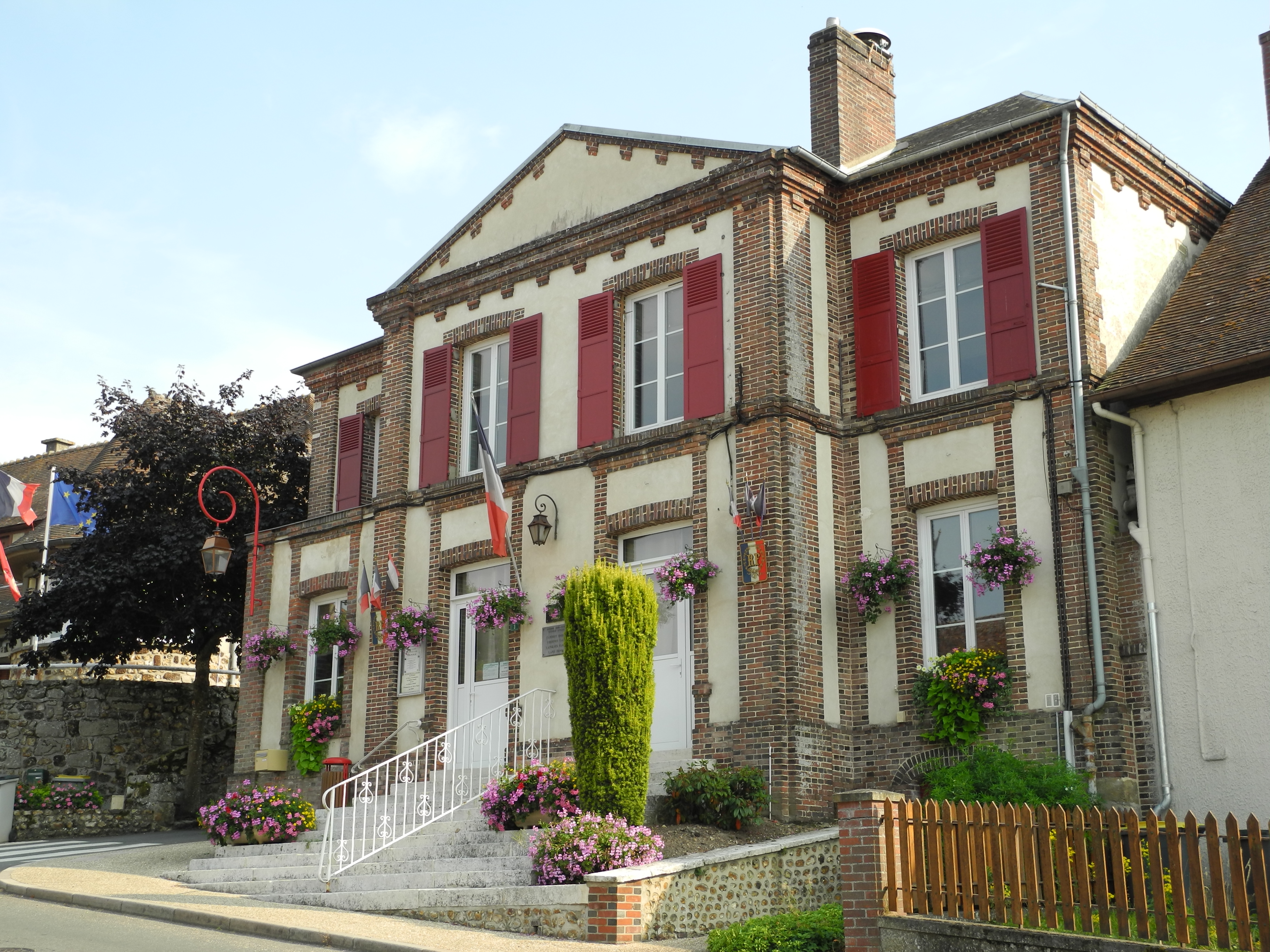 Mairie de La Vieille Lyre - Eure (27330)